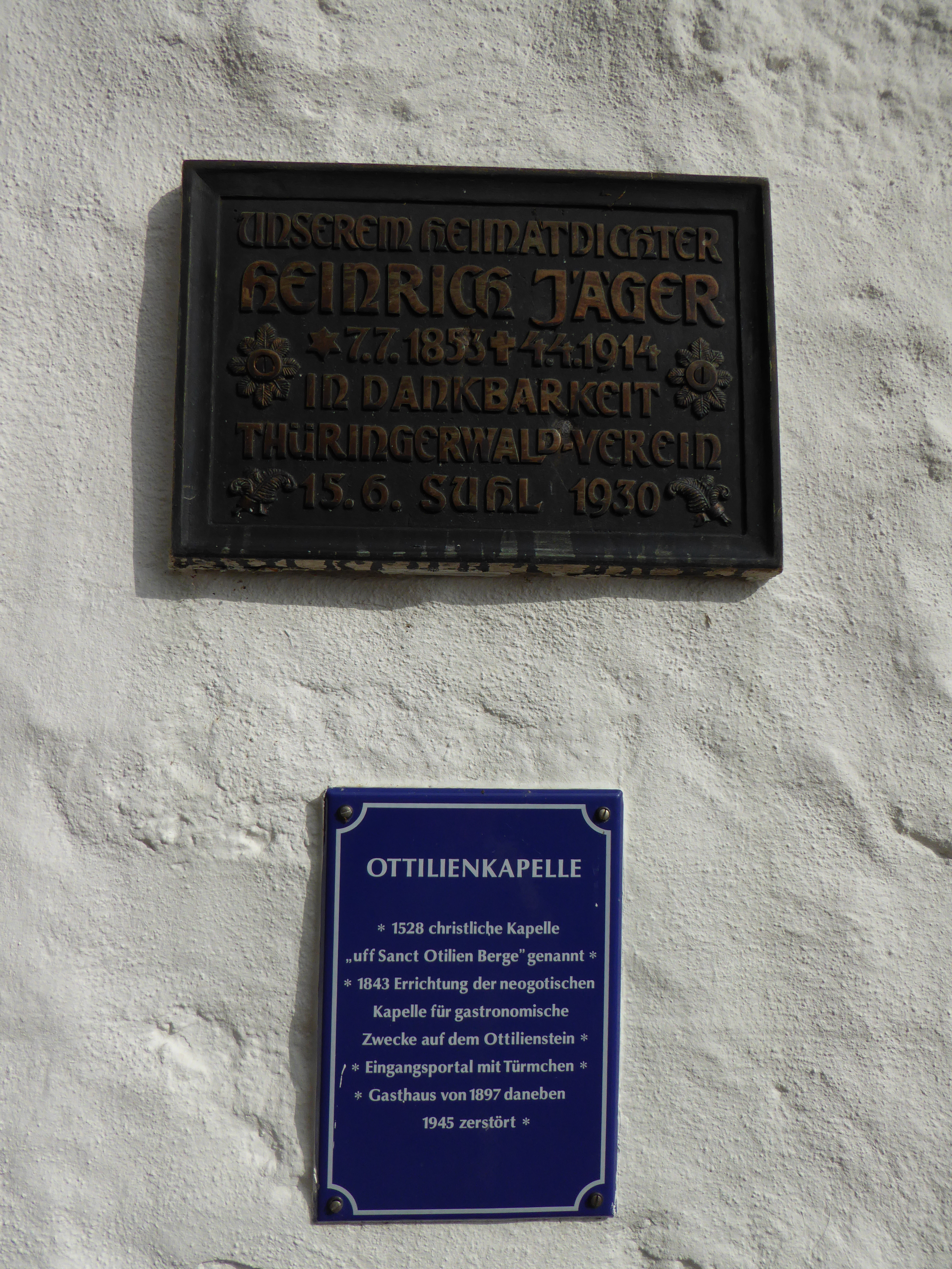 Suhl am Rennsteig und Umgebung